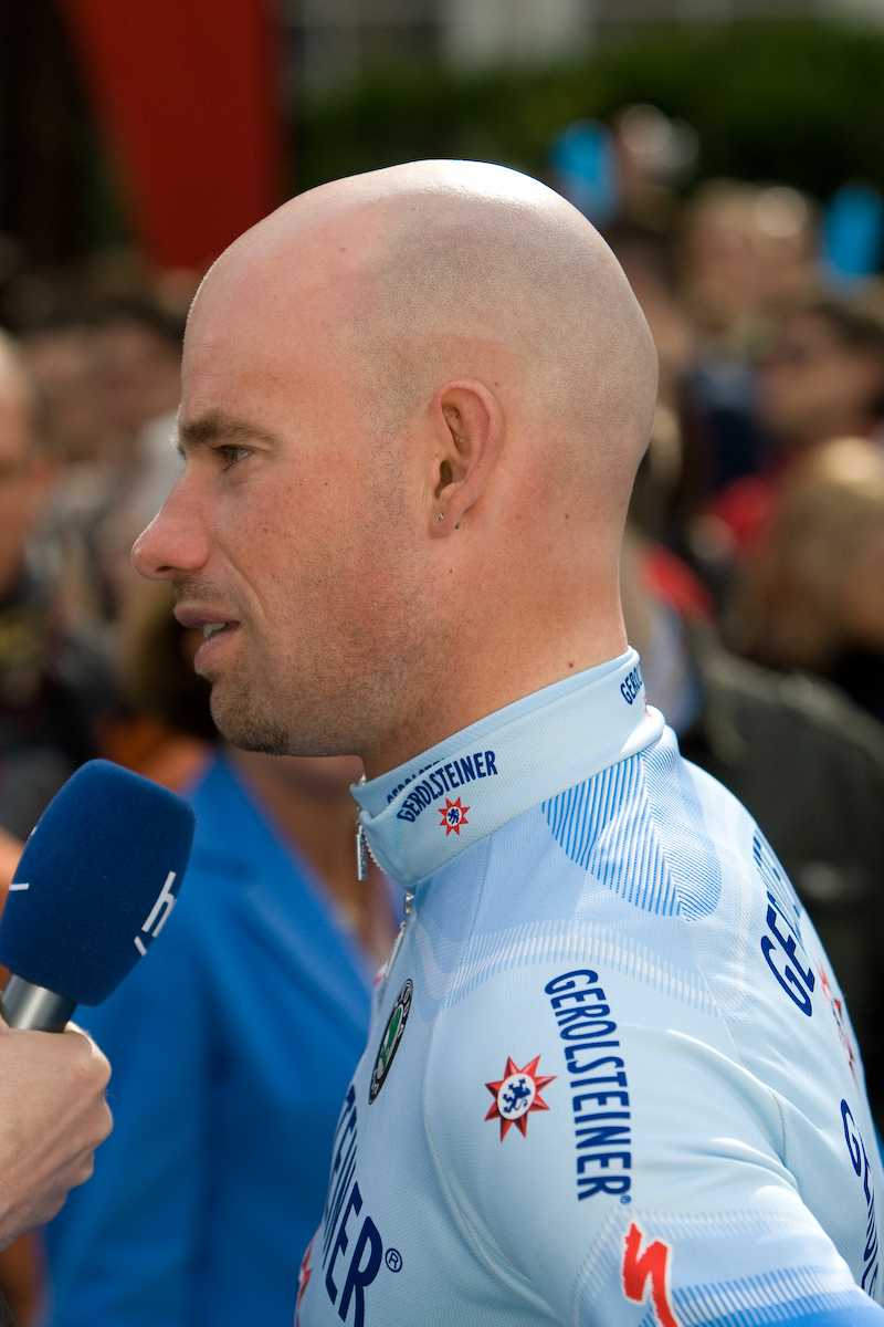 Stefan Schumacher, Rund um den Henninger Turm 2008.